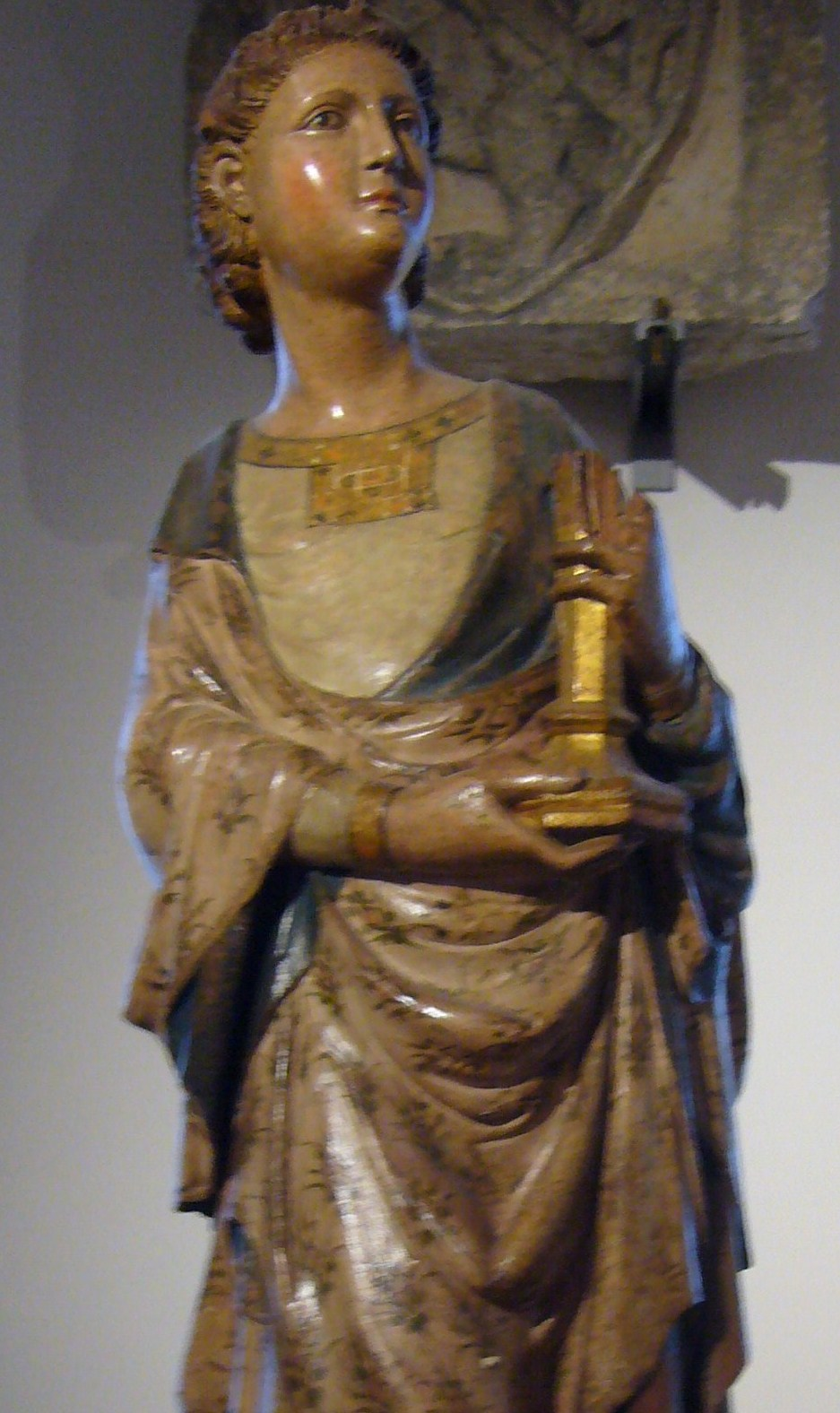 angelo reggi candelabro- scultura lignea- museo civico Palazzo Santi, Cascia